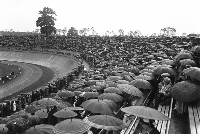 Das grosse Fest der deutschen Schule im Stadion in Berlin. Der Verein für das Deutschtum im Ausland, veranstaltete ein grosses Fest der deutschen Schule, an welcher über 20 000 Schüler und Schülerinnen teilnahmen ! Blick in das gewaltige Rund des Stadions mit 10 000 von Zuschauern unter Regenschirmen.